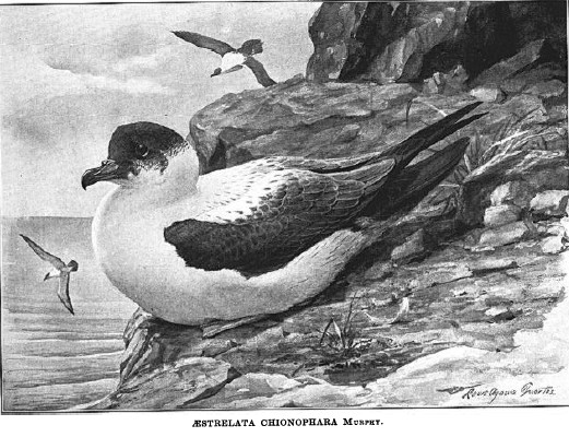 Aestrelata chionophara = Pterodroma arminjoniana (Giglioli & Salvadori, 1869)